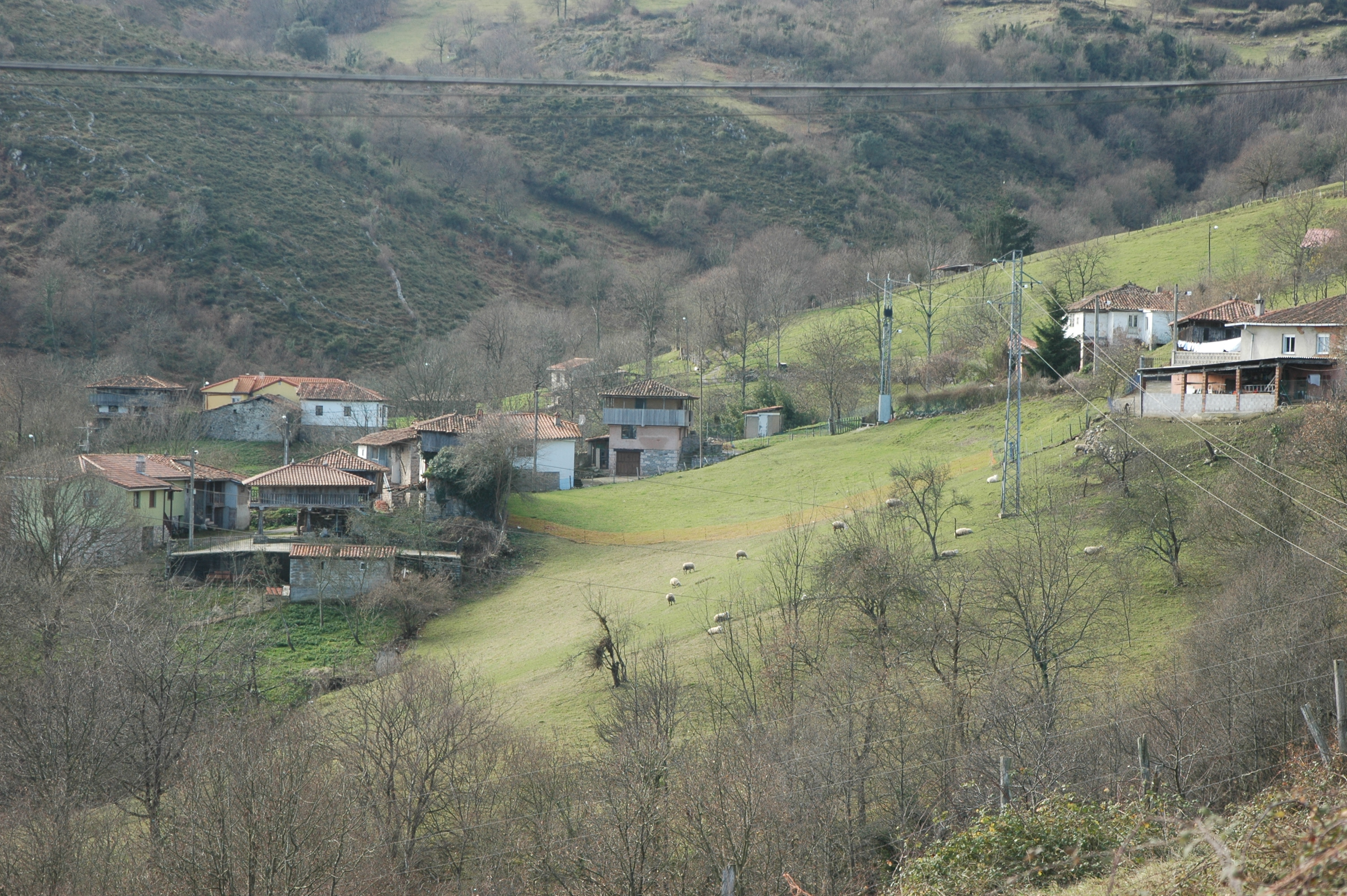 Vista del pueblu de Temia, na parroquia moscona de Rañeces